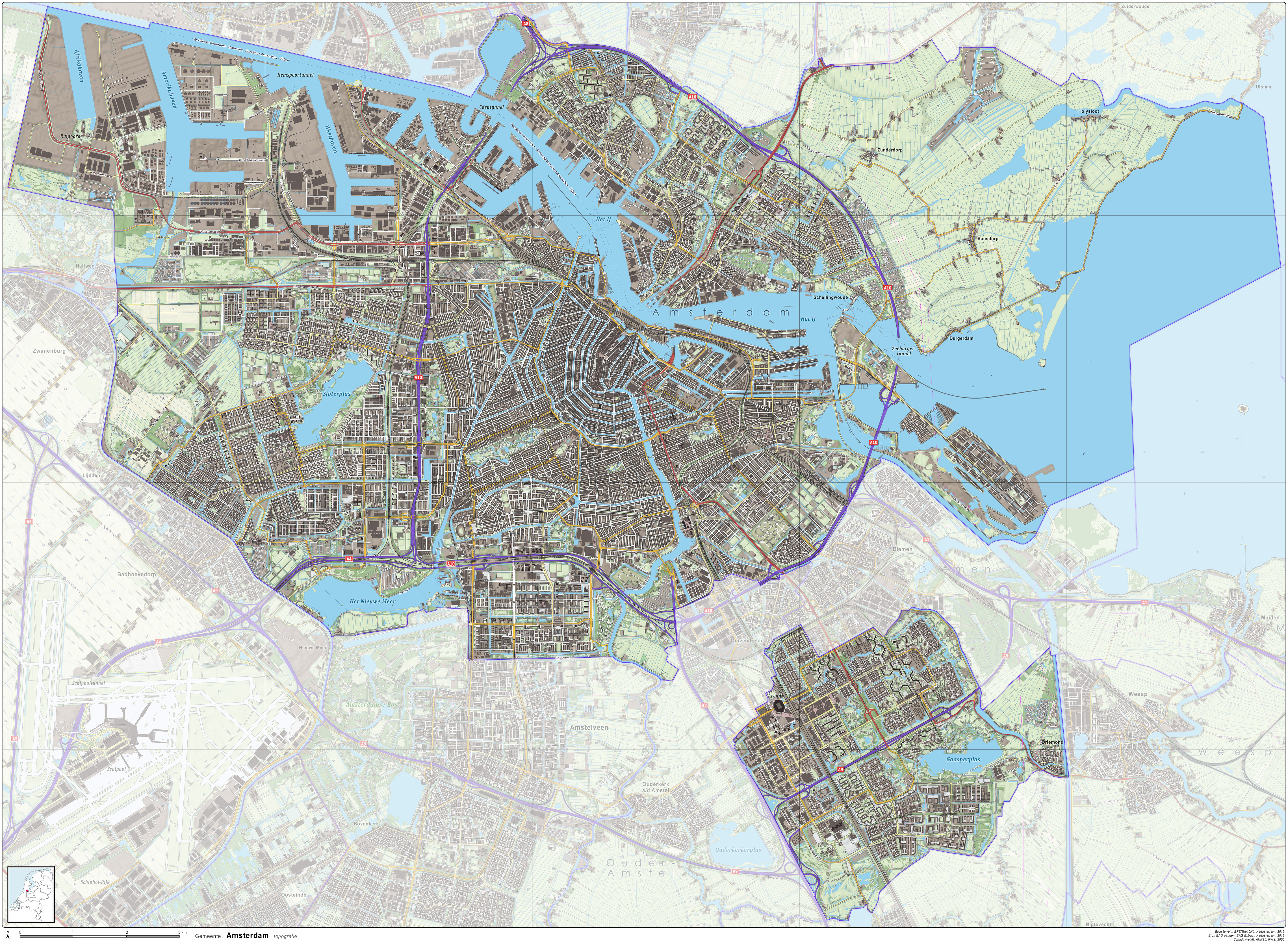 Topografische kaart van de Gemeente Amsterdam. Op basis van de GML open geodata van de Top10NL (basisregistratie Topografie, Kadaster 2011), vrijgegeven door Kadaster op 30-06-2012 onder de Creative Commons BY licentie. Gebouwvlakken uit Open Geodata BAG extract (juni 2012). Relief uit AHN25 van Rijkswaterstaat. Samenstelling en kleurenschema: Jan-Willem van Aalst, met QuantumGIS en Photoshop.